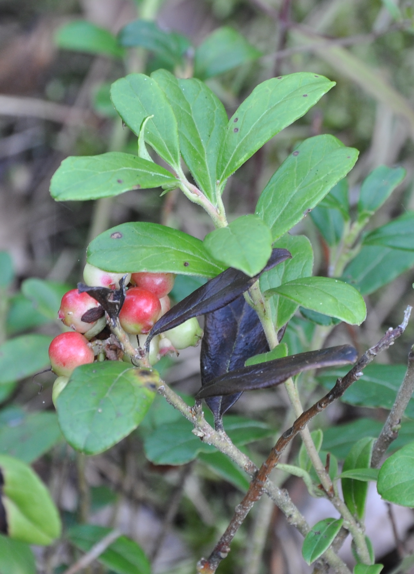 Borówka brusznica (Vaccinium vitis-idaea) w rezerwacie przyrody "Nadmorski bór bażynowy w Mrzeżynie"